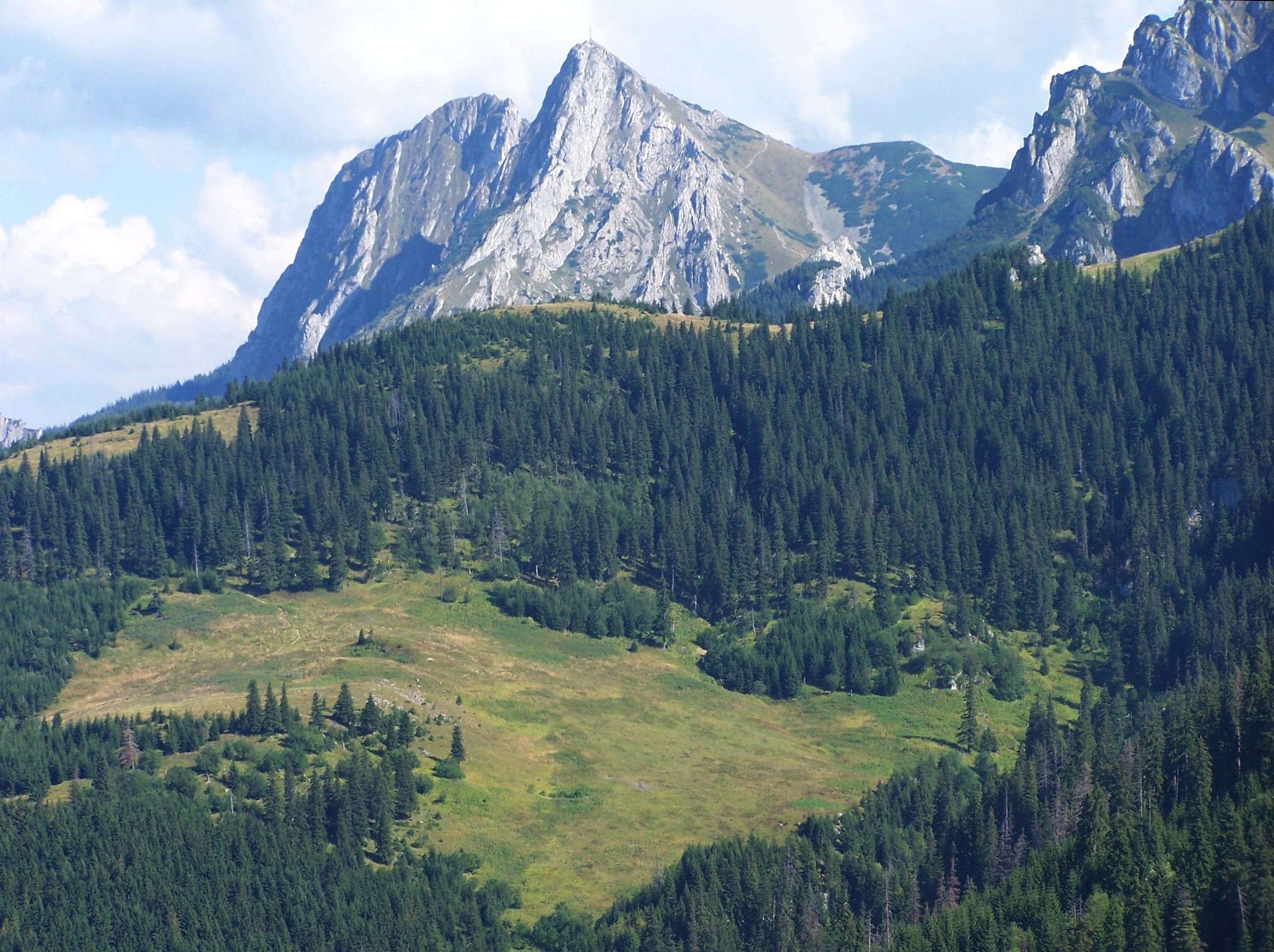 Widok z polany na Stołach. Pod Giewontem widoczna UPłaziańska Kopka, pod nią Polana Upłaz